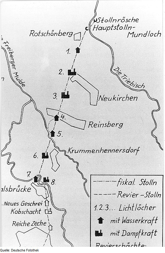 Original image description from the Deutsche FotothekTriebischtal-Rothschönberg. Rothschönberger Stollen Lageplan aus: Sächs. Heimatblätter 6, 1978